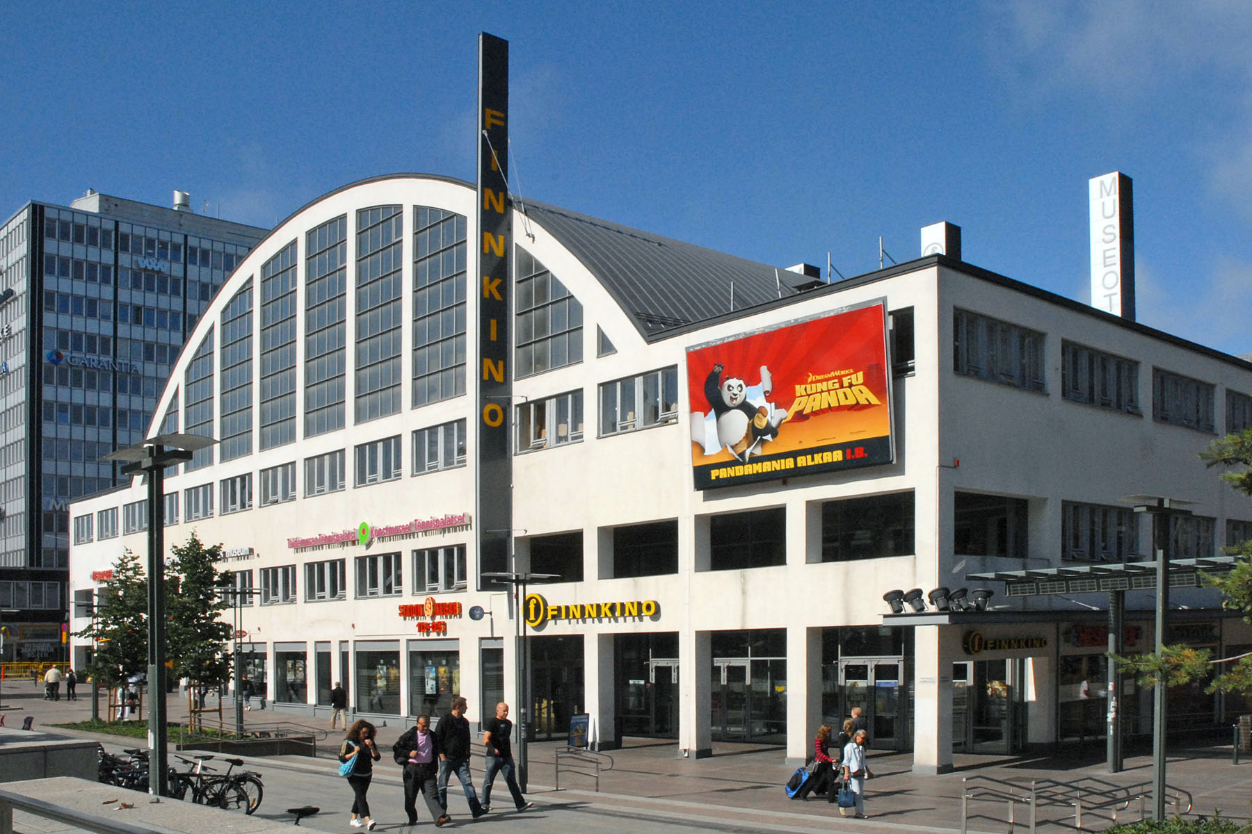 Le Musée des Cultures (Museum of Cultures) est installé dans le Tennispalatsi qui vient d'être réaménagé en vaste centre commercial comprenant des cinémas, des espaces de jeux video, deux musées, des restaurants et des bureaux.